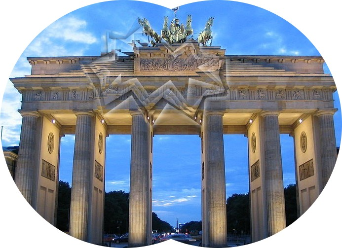 Fortifiktation, Wahrnehmungsstörung während einer Migräneaura mit charakteristischen an einen Fort erinnernde Zickzack-Strukturen.